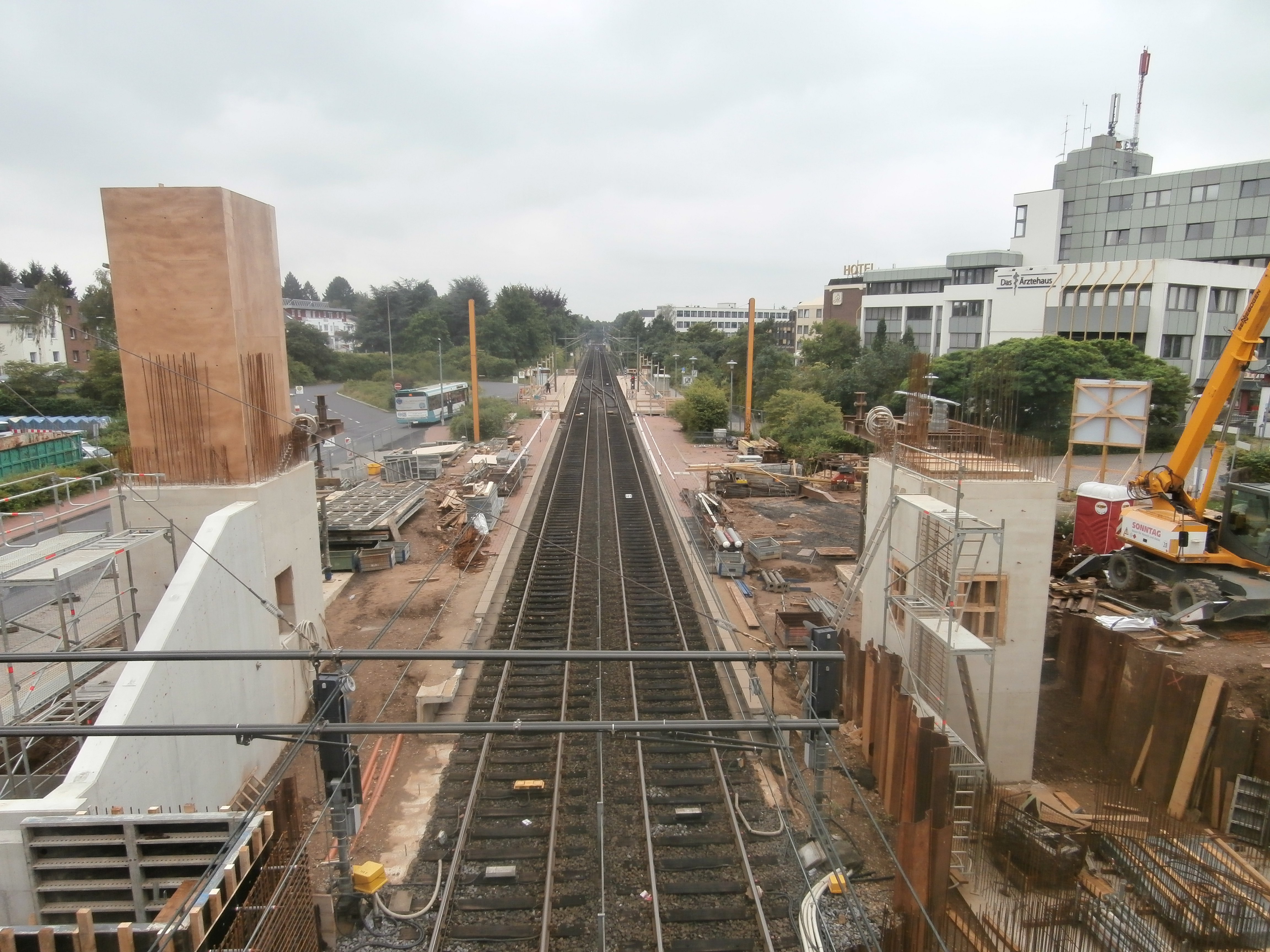 Stadtbahnhaltestelle Sankt Augustin Markt (seit 14. Dezember 2014 Sankt Augustin Zentrum/Hochschule Bonn-Rhein-Sieg), Sankt Augustin: Aufnahme während des im Dezember 2013 begonnenen Umbaus